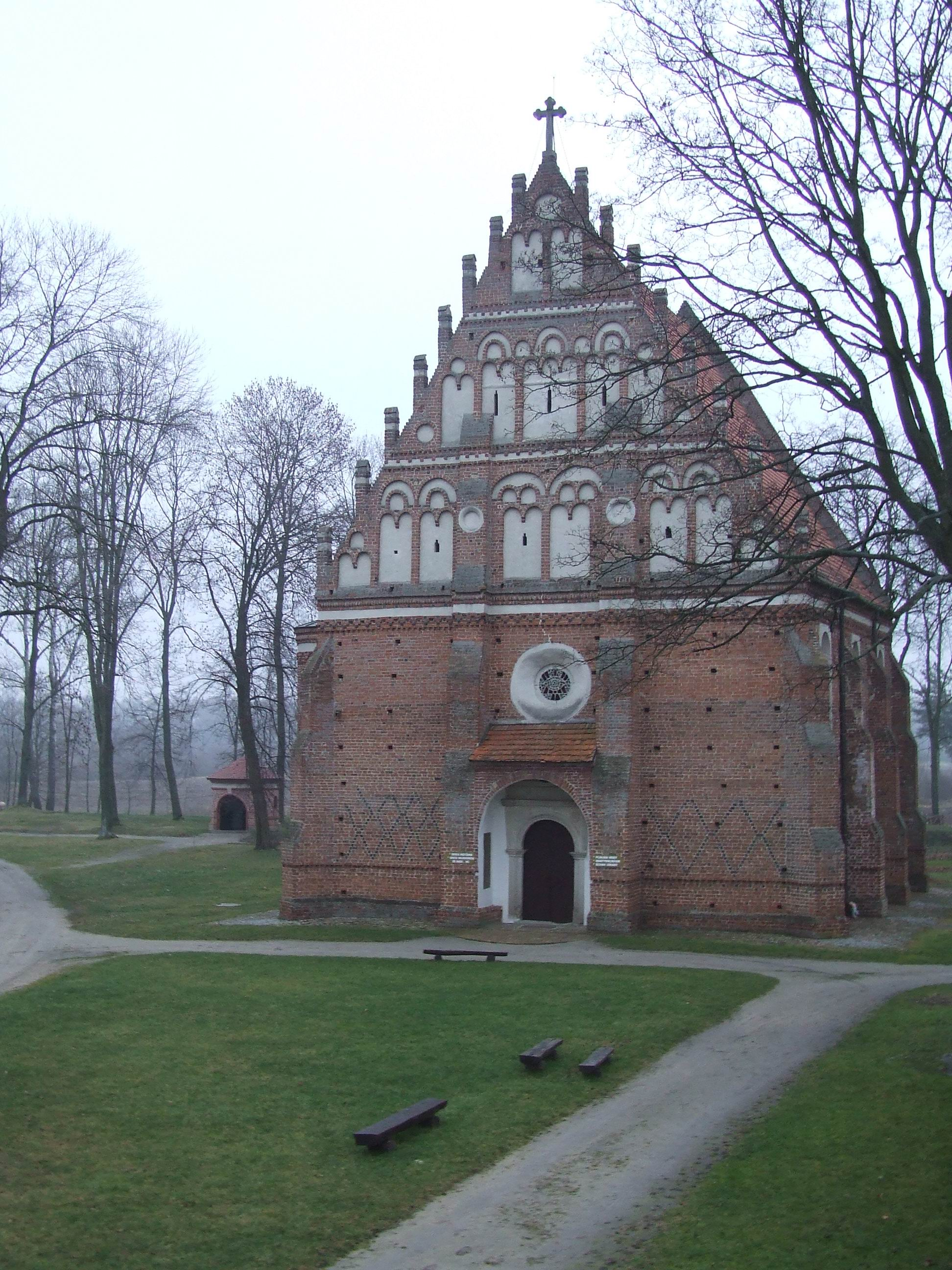 Kodeń, kościół filialny p.w. św. Ducha, cerkiew zamkowa z 1530